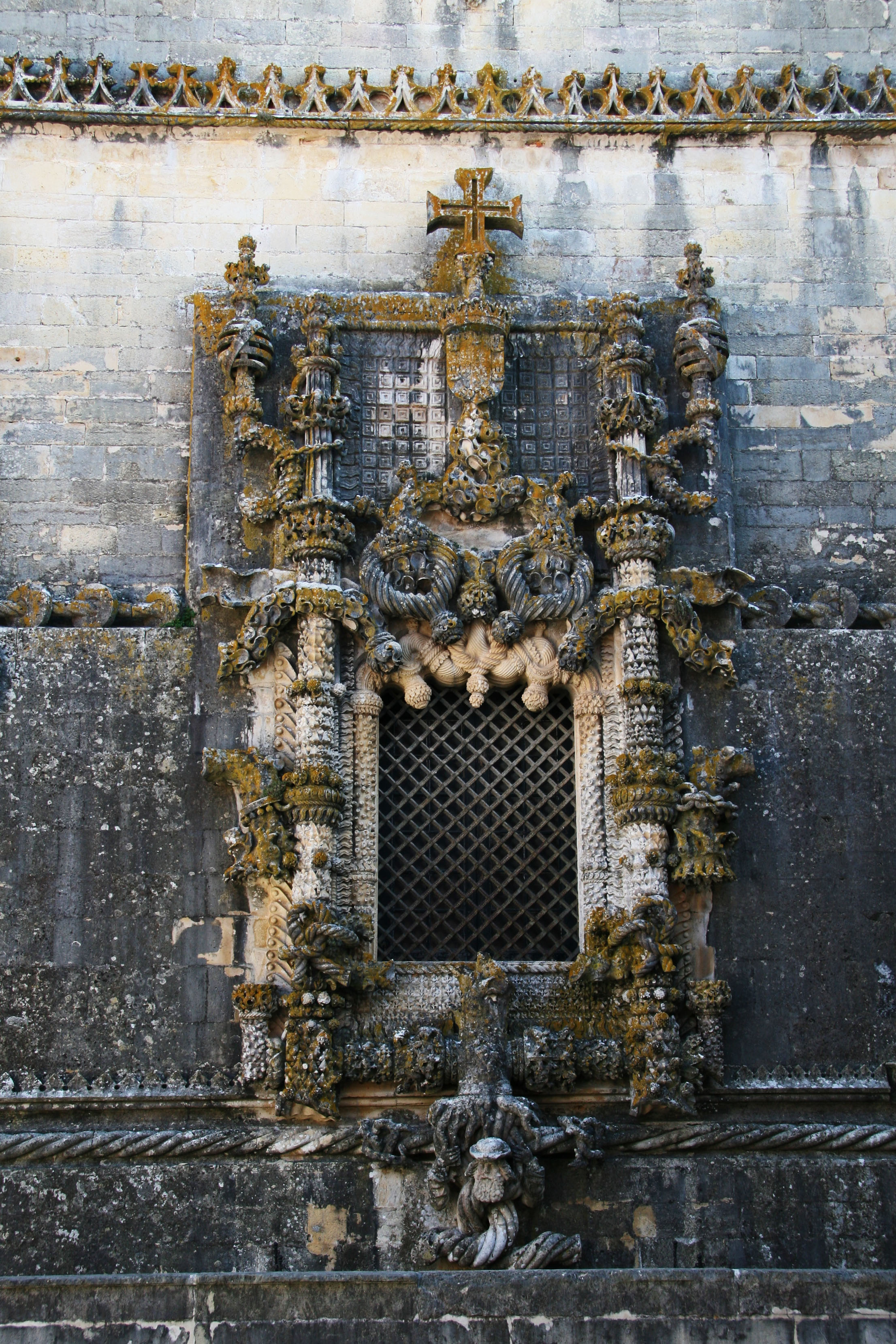 Manuelinisches Fenster am Christuskloster in Tomar, Portugal